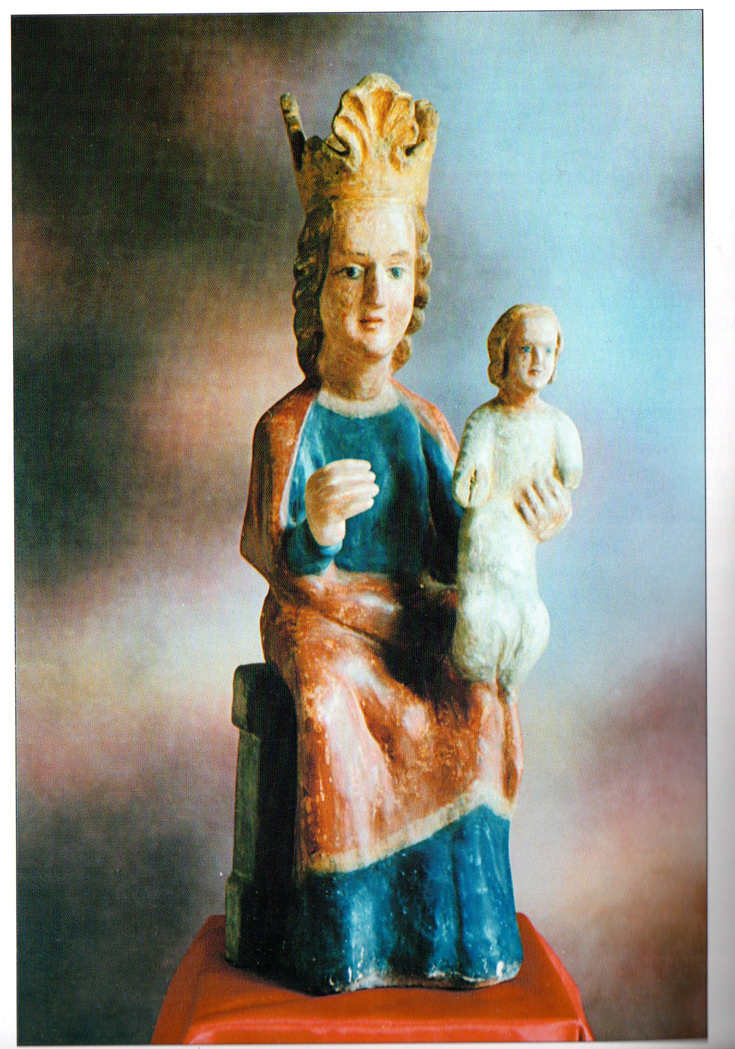 Conservata nella chiesa di Barbania (Italia)